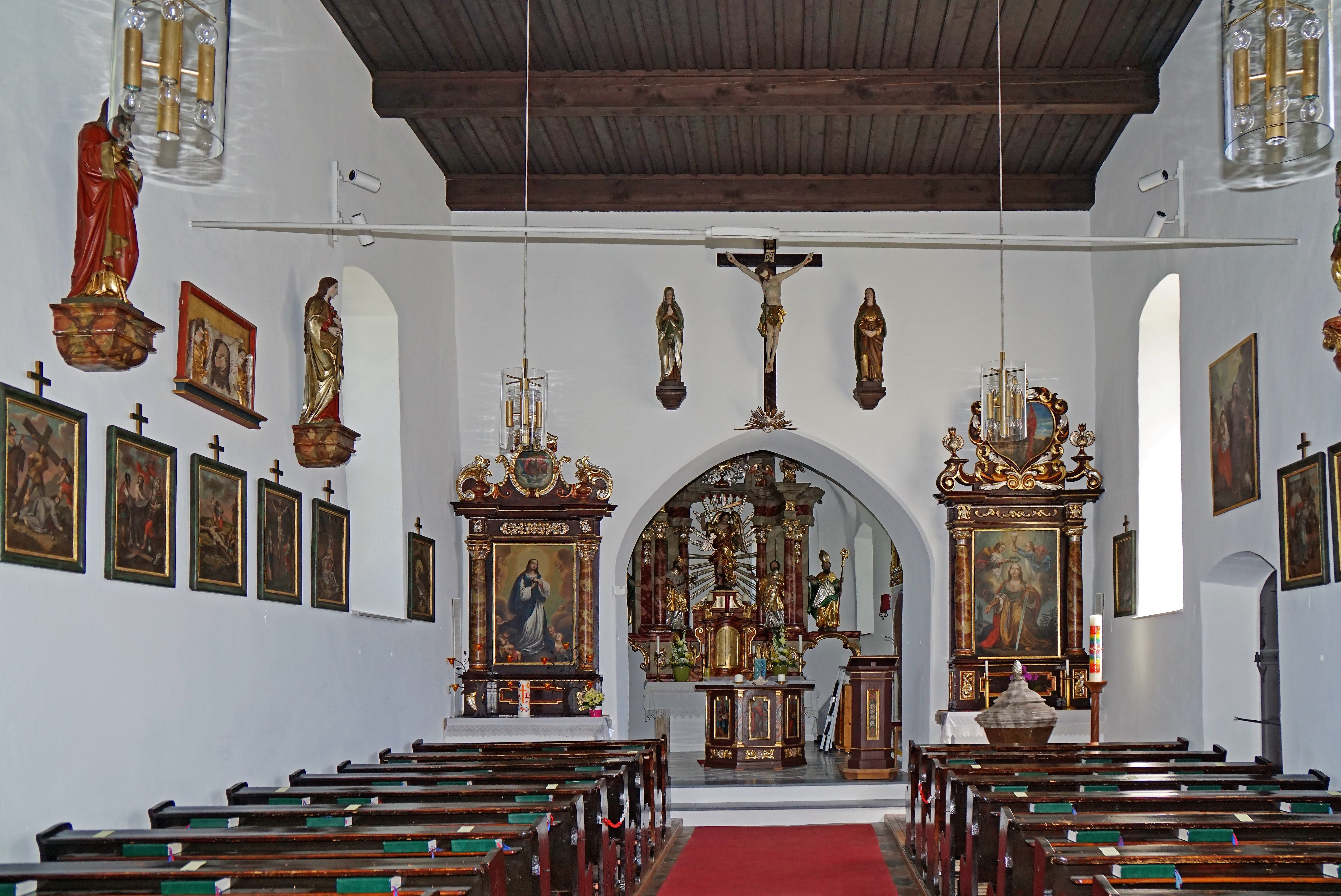 Kath. Pfarrkirche Fürnitz, Innenansicht